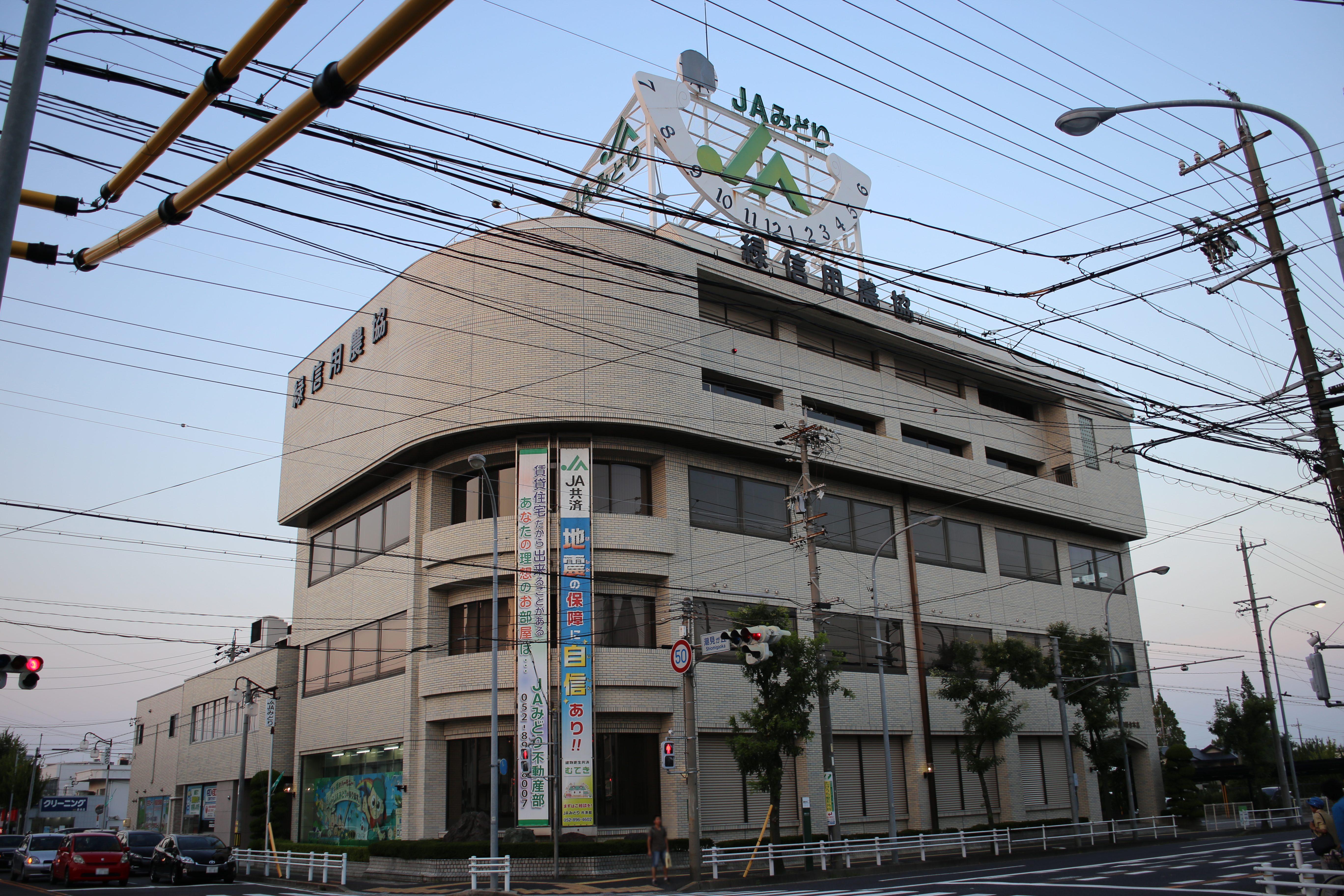 名古屋市緑区潮見が丘二丁目の緑信用農業協同組合本店を南側公道西側より撮影。ただし、ナンバープレート・肖像権保護のため画像処理済。